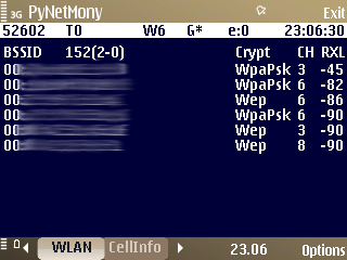 Screenshot wardrivingové aplikace pro mobilní telefony. Citlivé údaje (BSSID sítě), jsem záměrně znehodnotil.